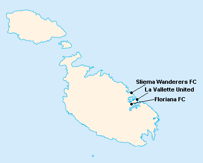 Répartition des clubs en First Division Maltaise 1928-1929.